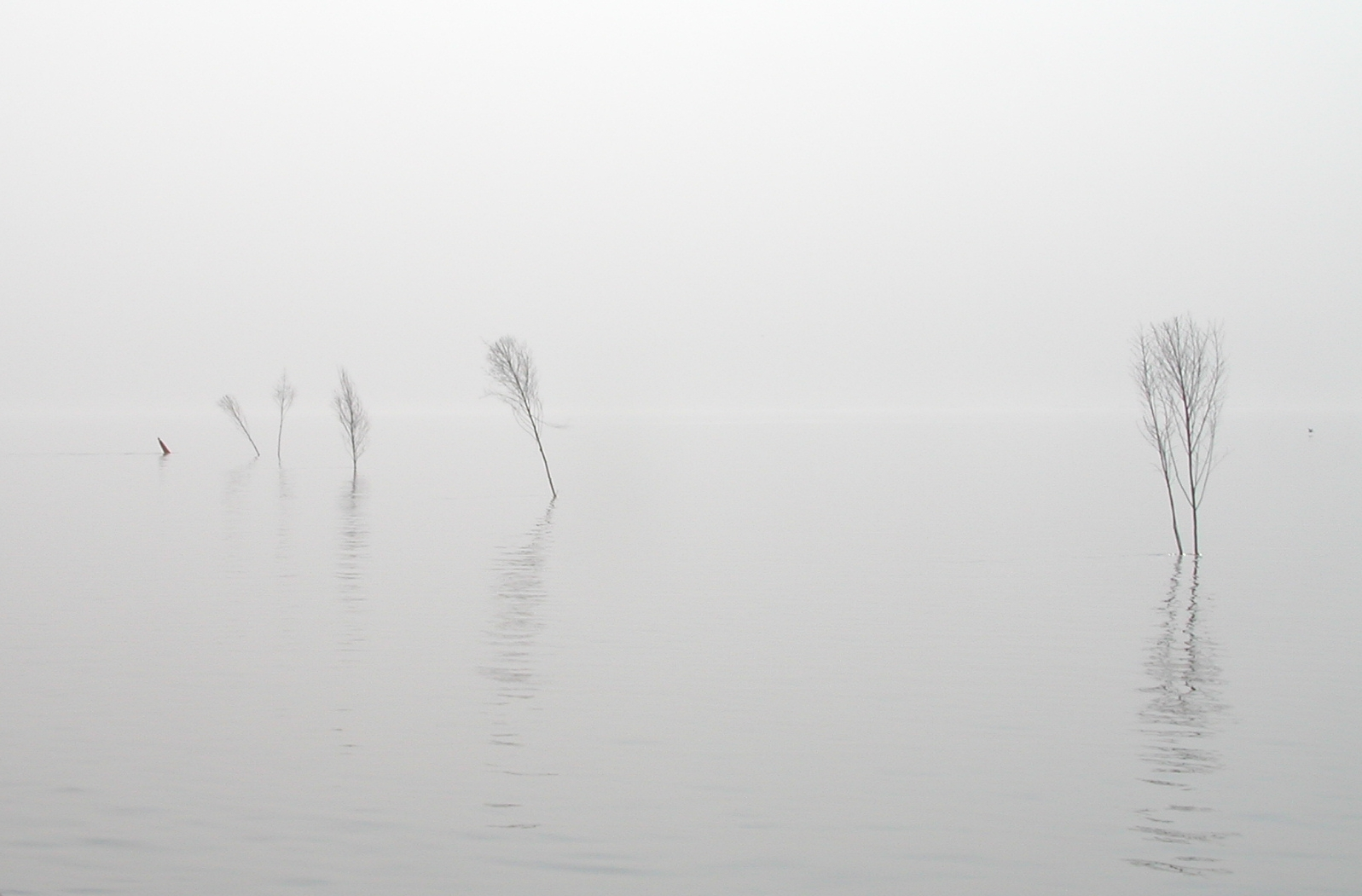 Prickenweg mit Anfangstonne vor Amrum